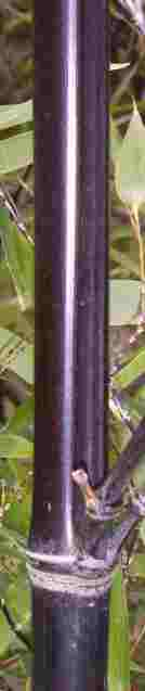 Canya de Bambú negre